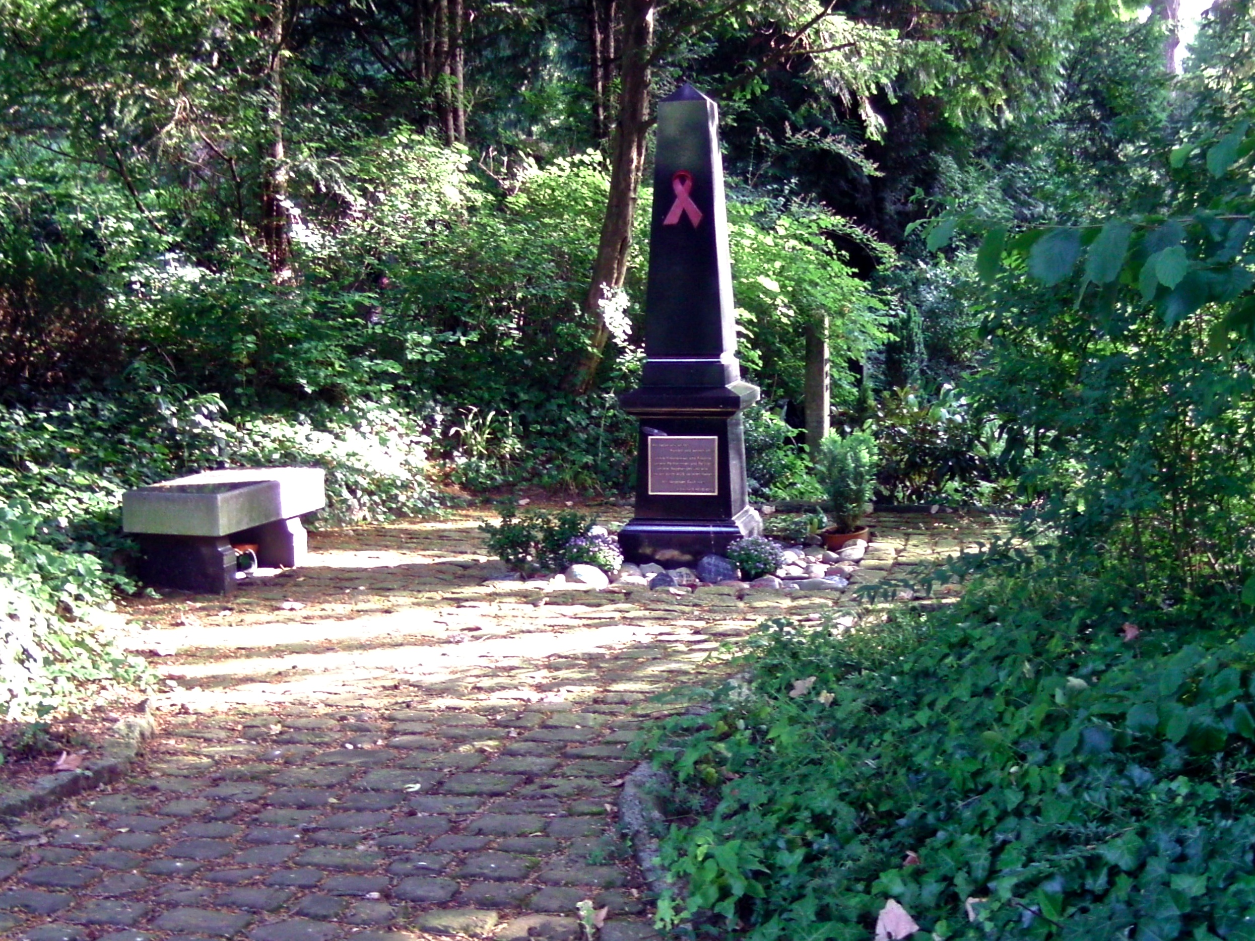 VIII. Ort des Gedenkens auf dem Bergfriedhof Heidelberg für alle die ihre Freunde und Angehörigen durch AIDS verloren haben.jpg